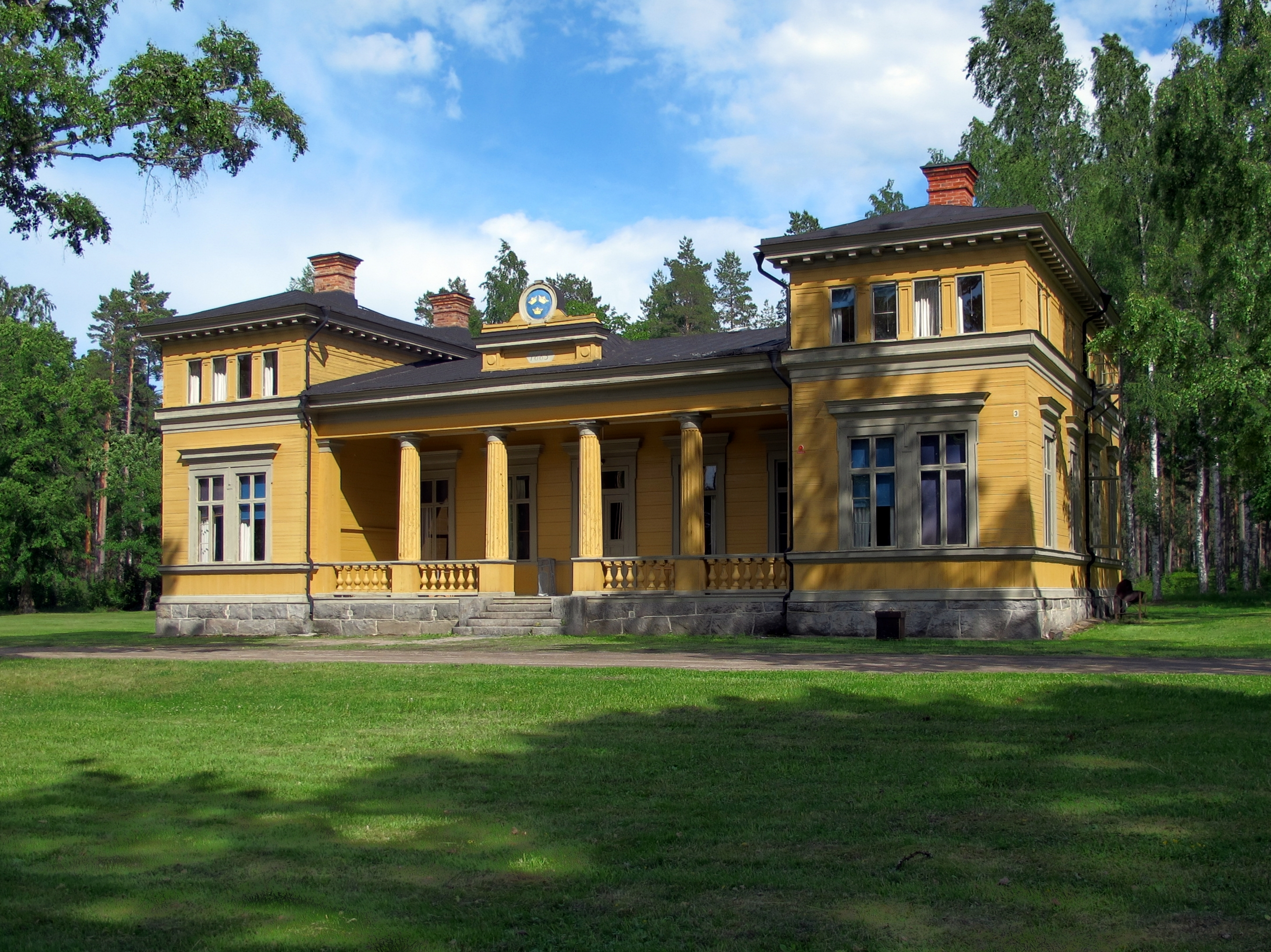 En av officerspaviljongerna vid Marma läger med året 1885.